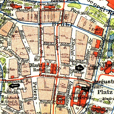 Die Leipziger Innenstadt auf einer Karte um 1913. Das hier noch bebaute Gebiet nördlich des Marktes bildet heute den Sachsenplatz.